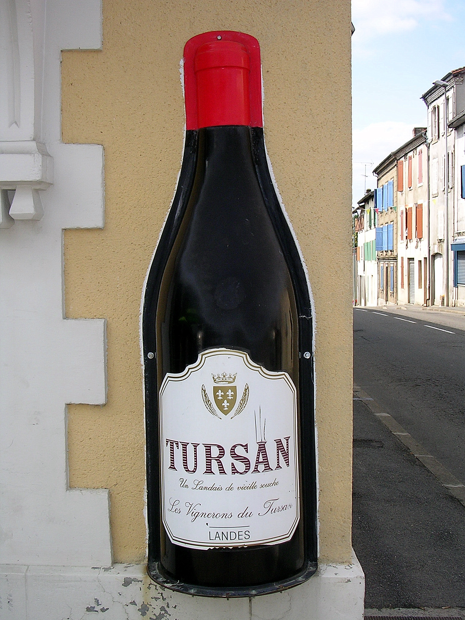 Bouteille publicitaire de vin de Tursan (photo prise à Saint-Sever, Landes, France)